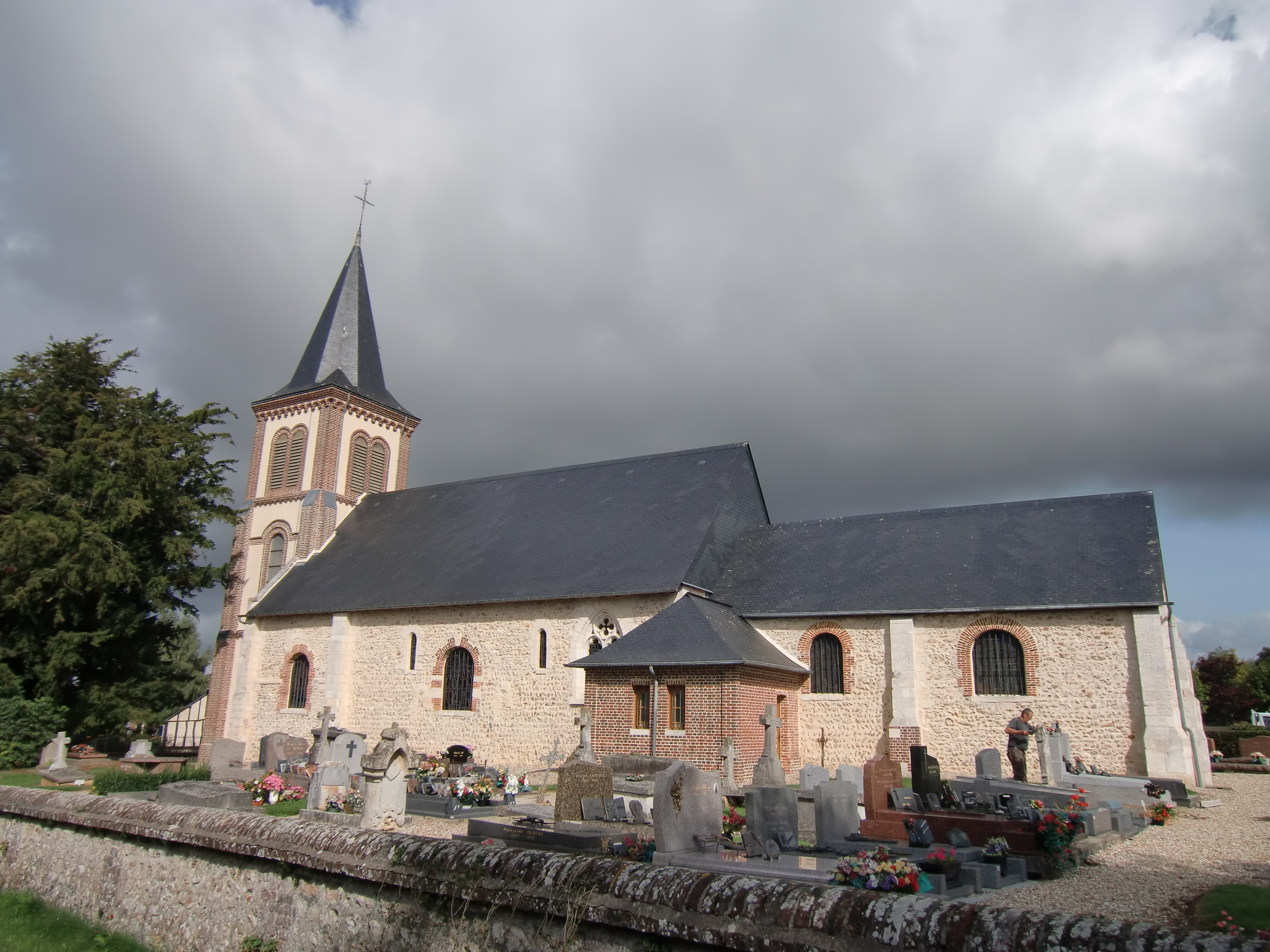 église de Valletot (Eure, Normandie, France)